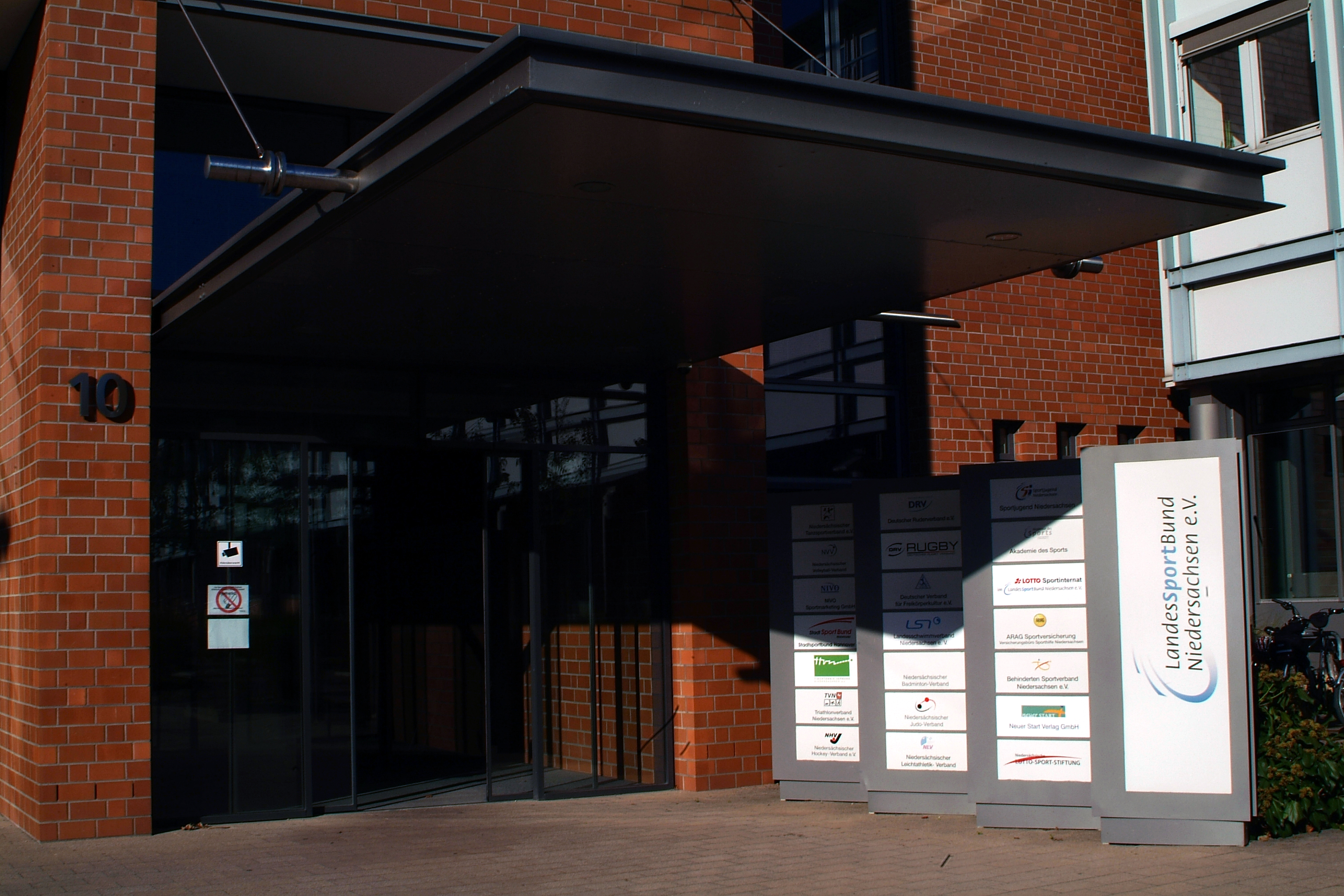 Eingang zum Landessportbund Niedersachsen sowie zum Niedersächsischen Lotto-Sport-Stiftung am Ferdinand-Wilhelm-Fricke-Weg 10 ...